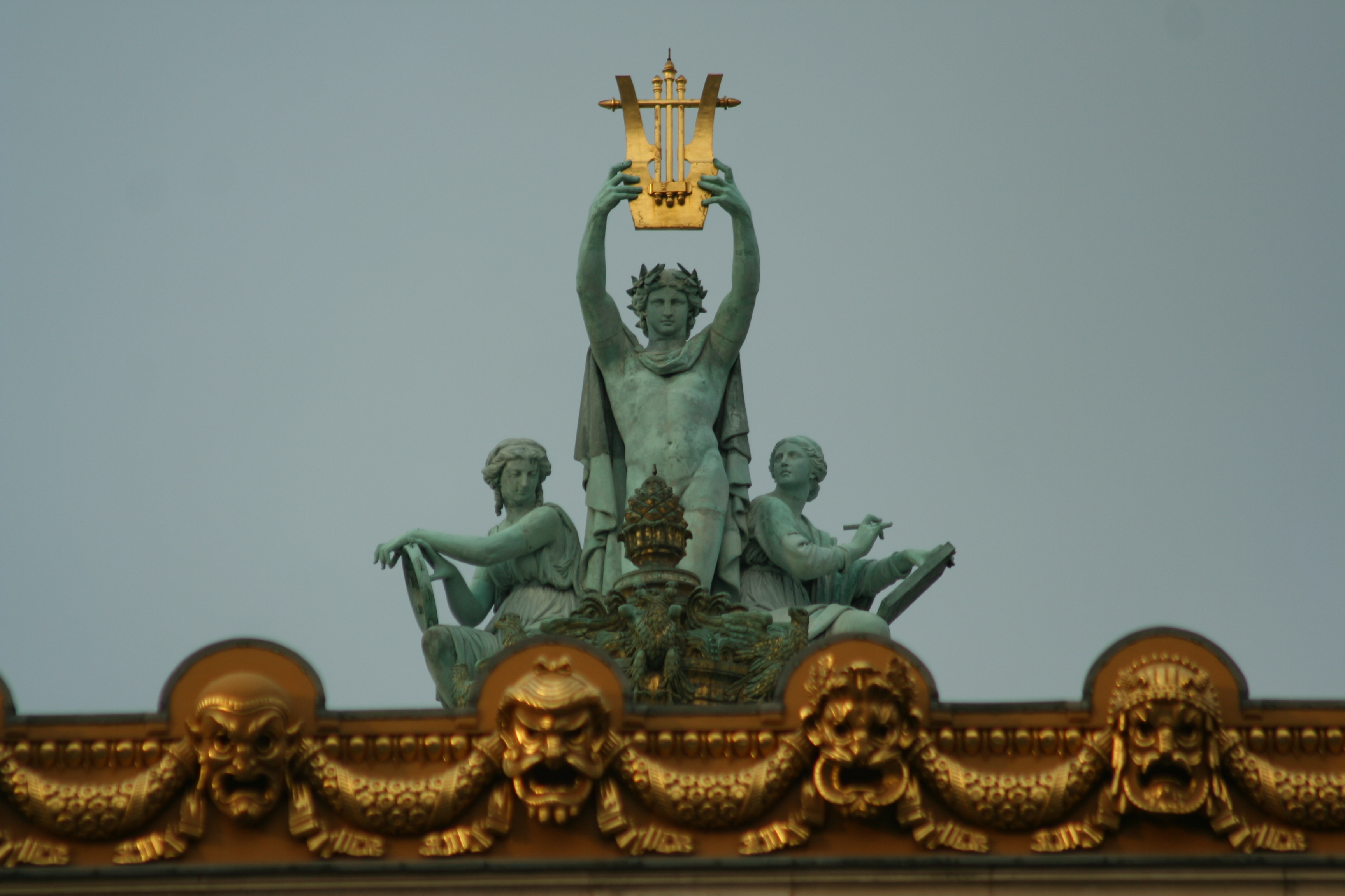 statue on the roof of the opera garnier "Apollon, la Poésie et la Musique" : sculpture en bronze et en feuille d'or d'Aimé Millet